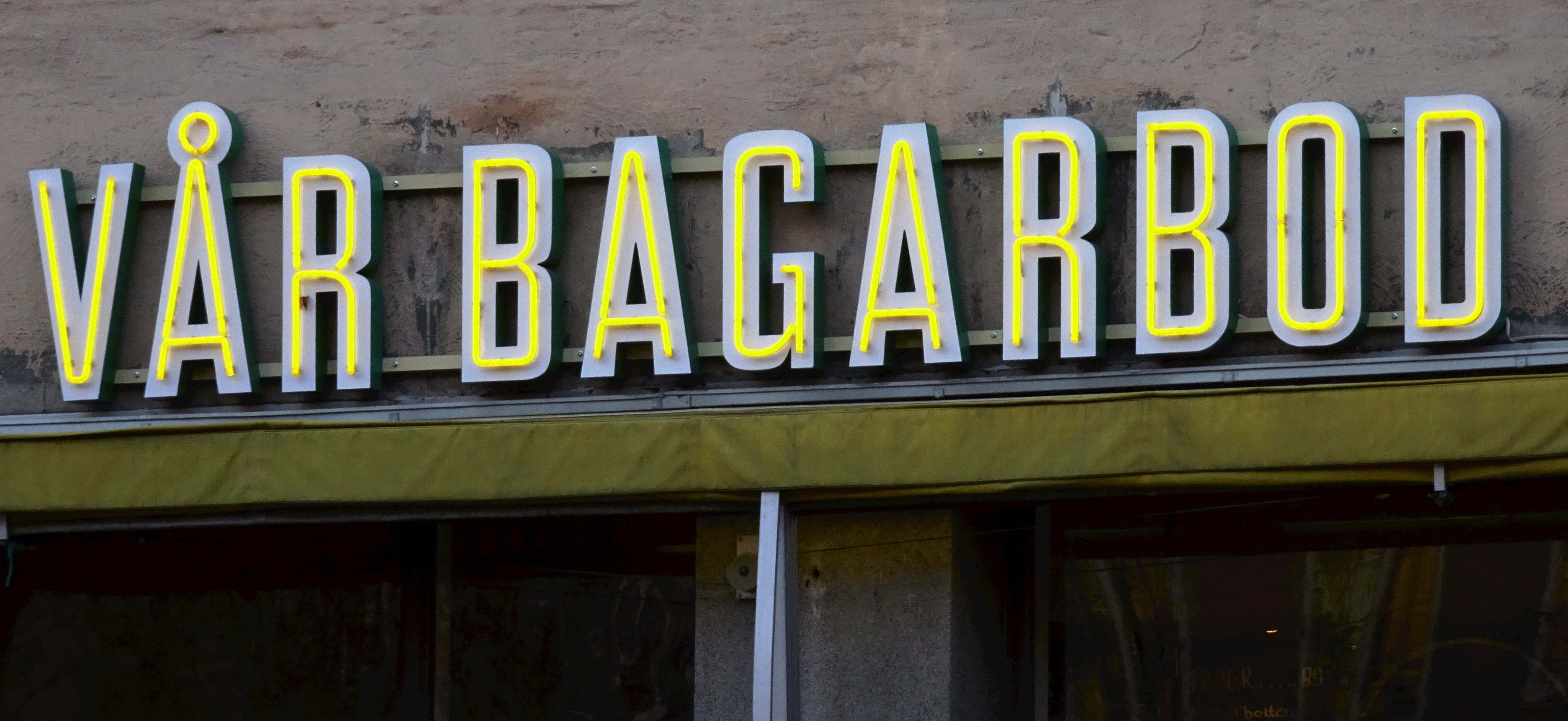 Vår Bagarbod, tidigare "Vår Bod", Ringvägen 129